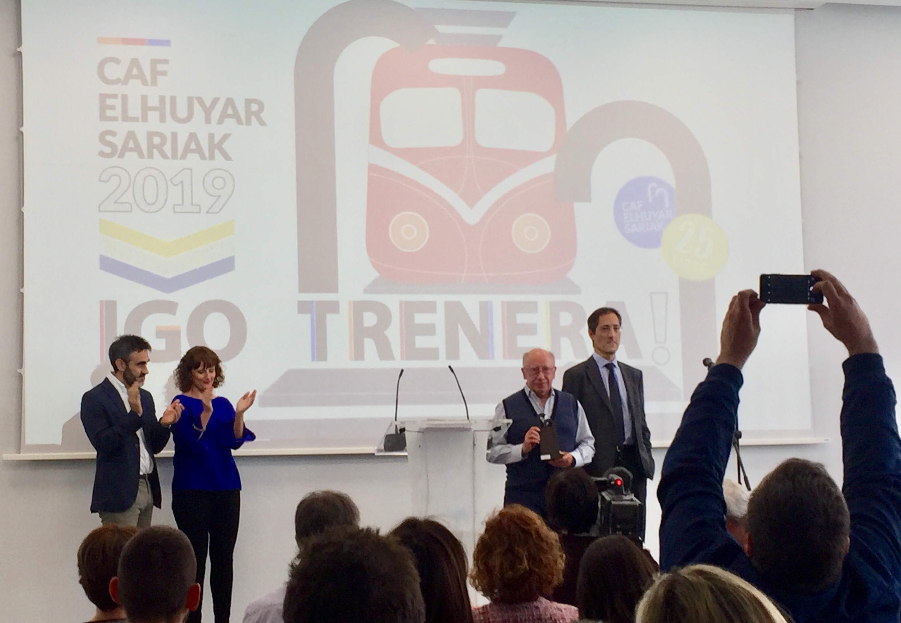 Jesus Mari Txurruka biologoa Elhuyar Merezimedu sariarekin